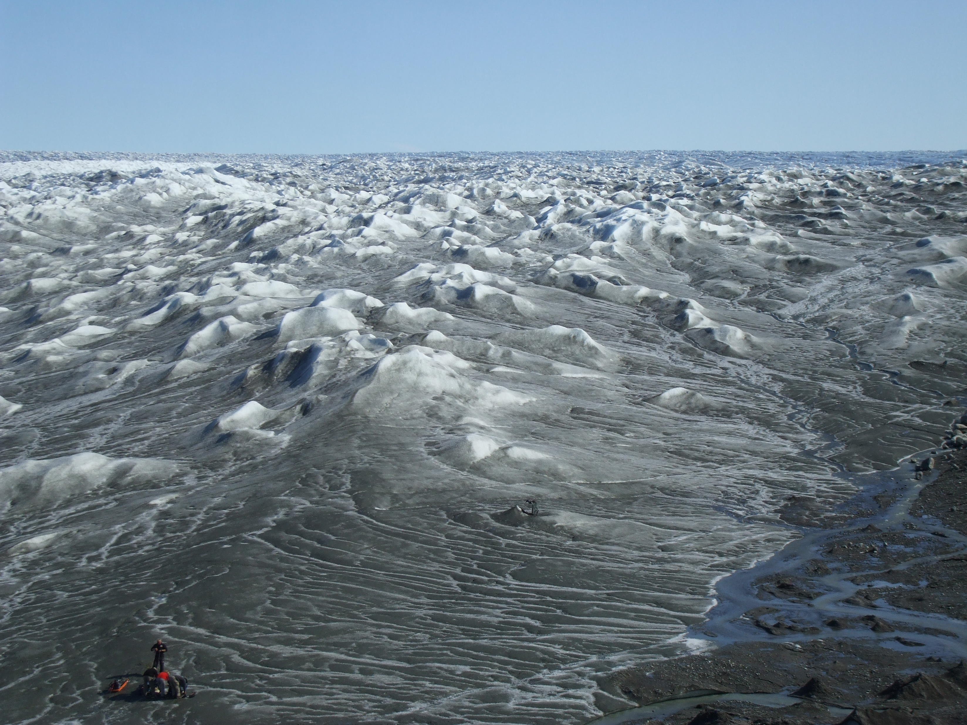 Point 660 Groenland 2009 Expédition ACarré